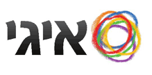 עמותת איגי